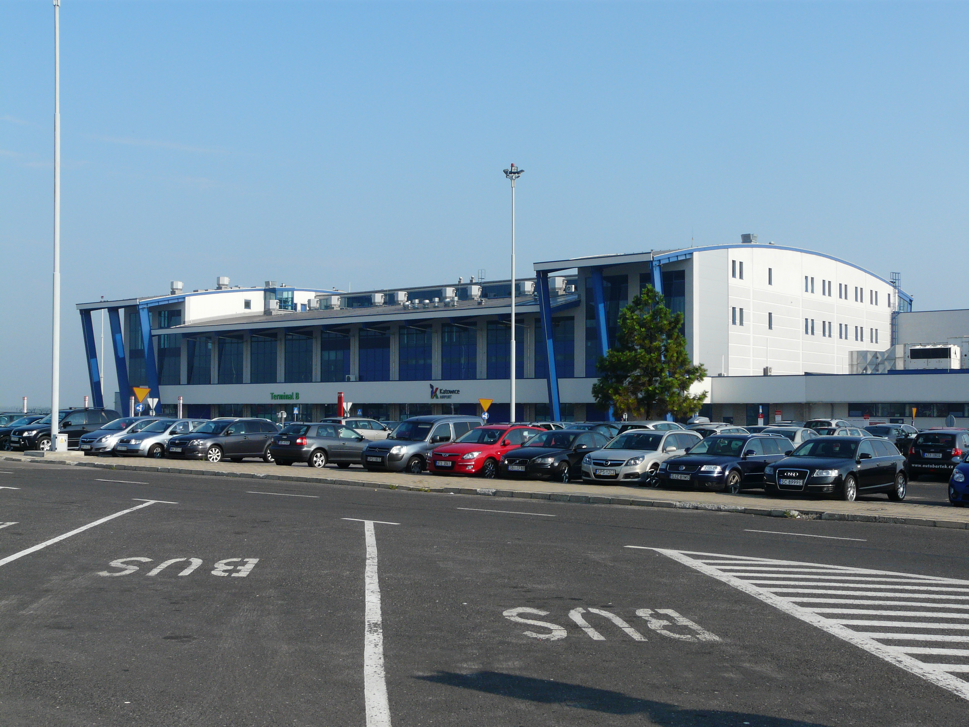 Katowice-Pyrzowice Airport terminal B